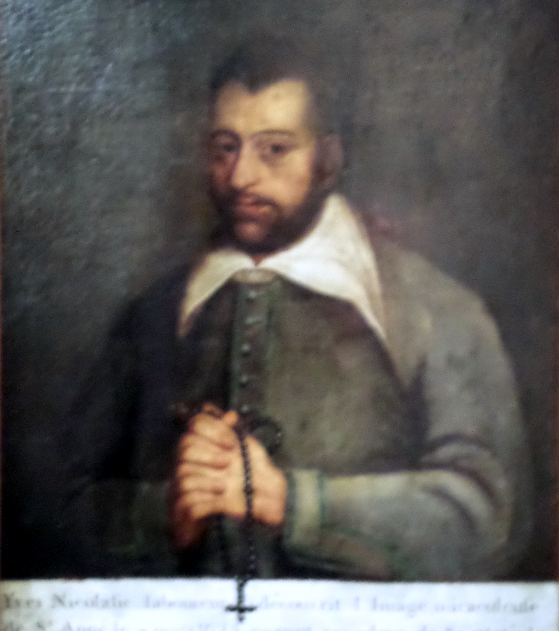 Poltred Iwan Nikolazig e penniliz Santez-Anna-Gwened.